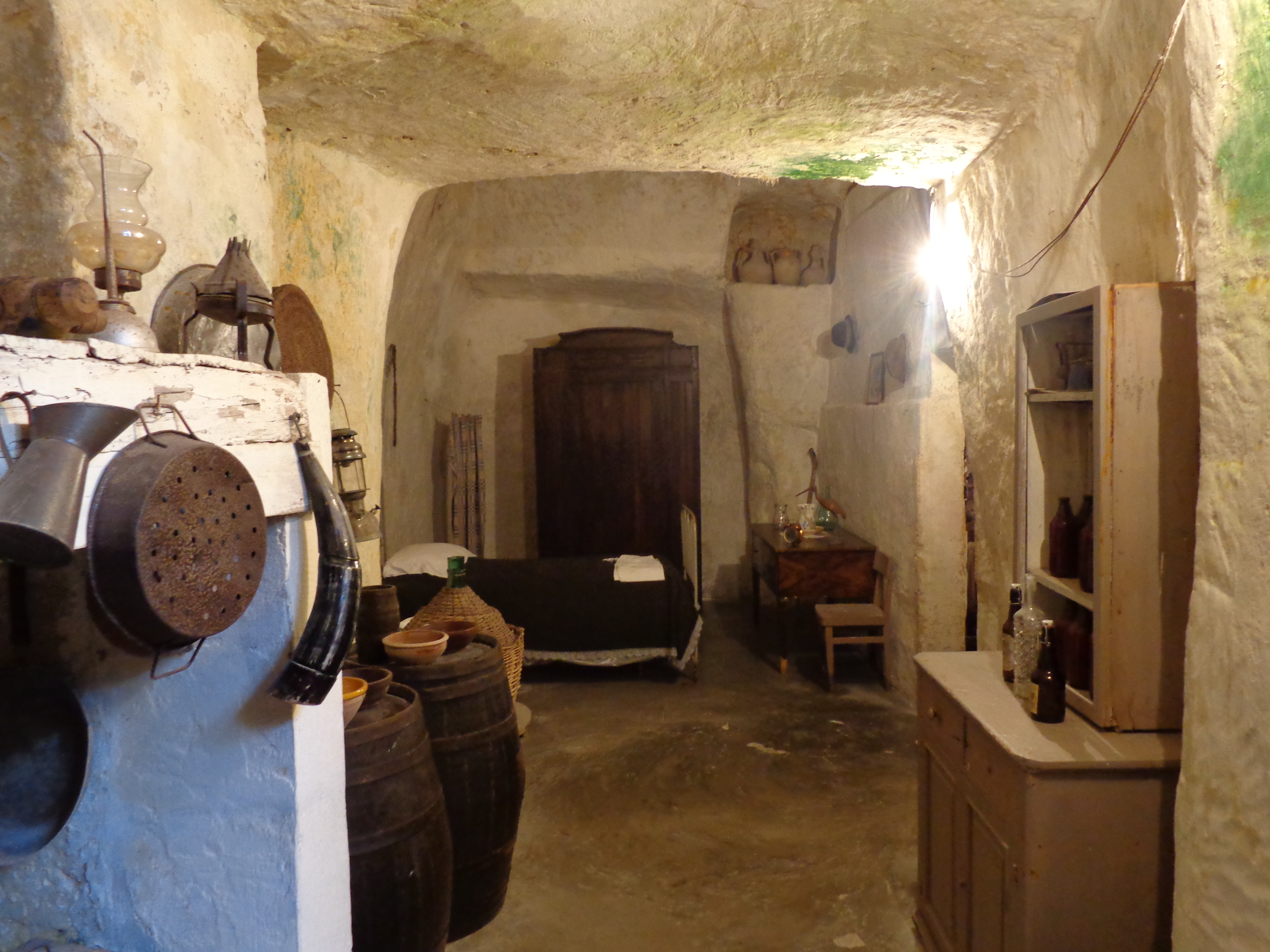 Casa Grotta di Vico Solitario, Matera